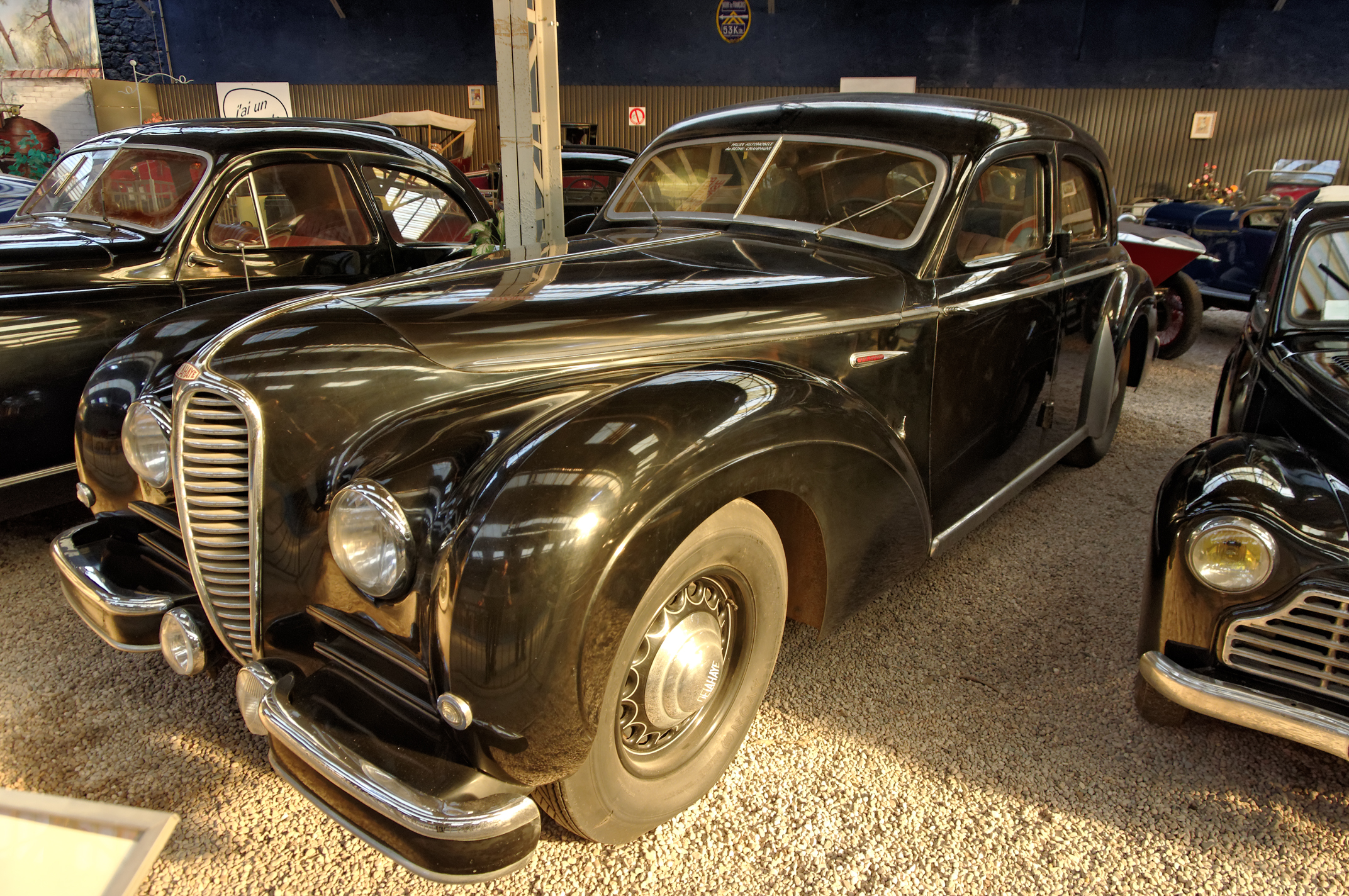 Delahaye 180 (1948), Berline 5/6 places, 6 cyl. en ligne, 4500 cm3, 140 ch., vitesse max. 160 km/h(Musée Automobile Reims Champagne, Reims, Marne, France)